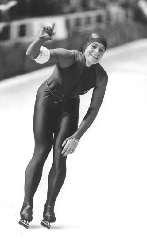 Gunda Kleemann ADN-ZB Oberst 11.12.88 Berlin: DDR-Einzelstrecken-Meisterschaften der Eisschnelläufer- Die Erfurterin Gunda Kleemann setzte sich bei den Wettkämpfen eindrucksvoll in Szene. Jeder der drei Wettkampftage brachte für die ehemalige Leichtathletin eine Goldmedaille. Als Höhepunkt sorgte sie zum Abschluß für einen neuen Bahnrekord. Über 5000m lief sie in 7:35,57 min.